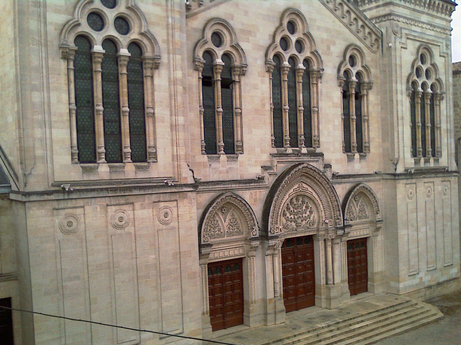 Vue de la façade de la synagogue de Bordeaux